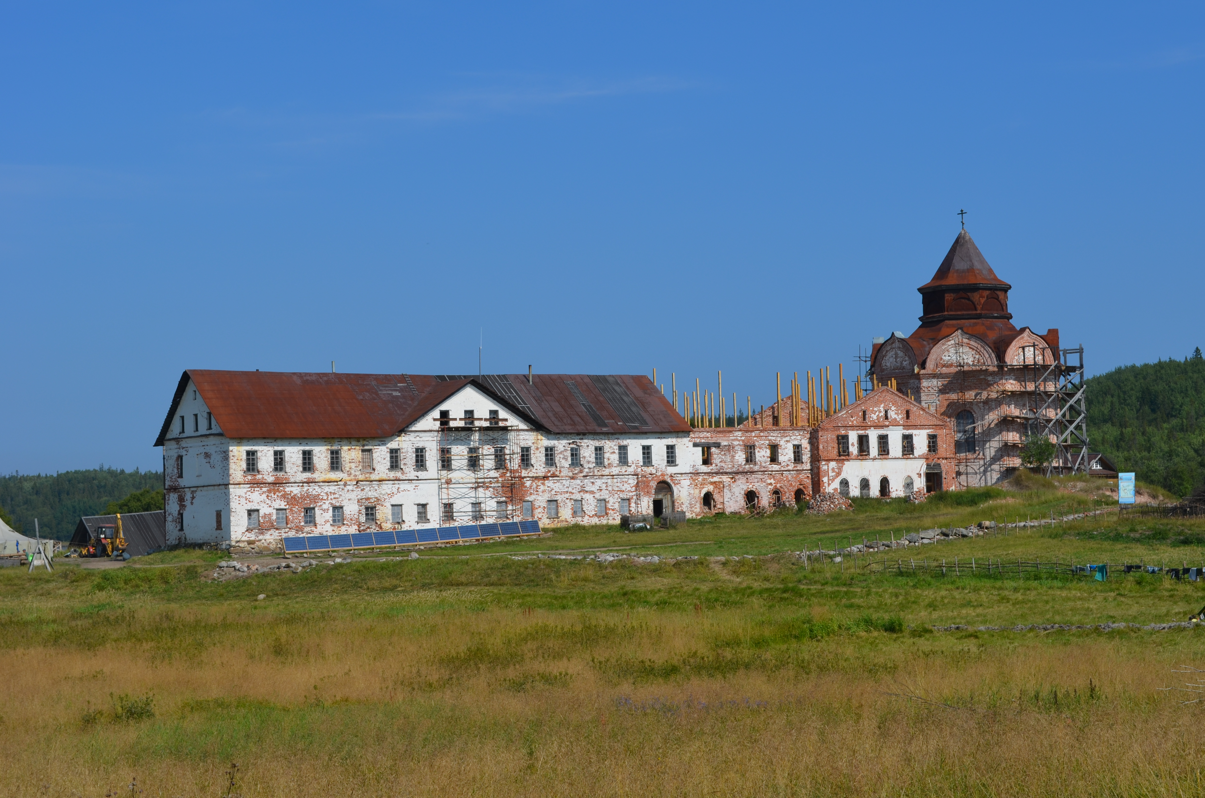 Свято-Троицкий скит (о. Анзер)